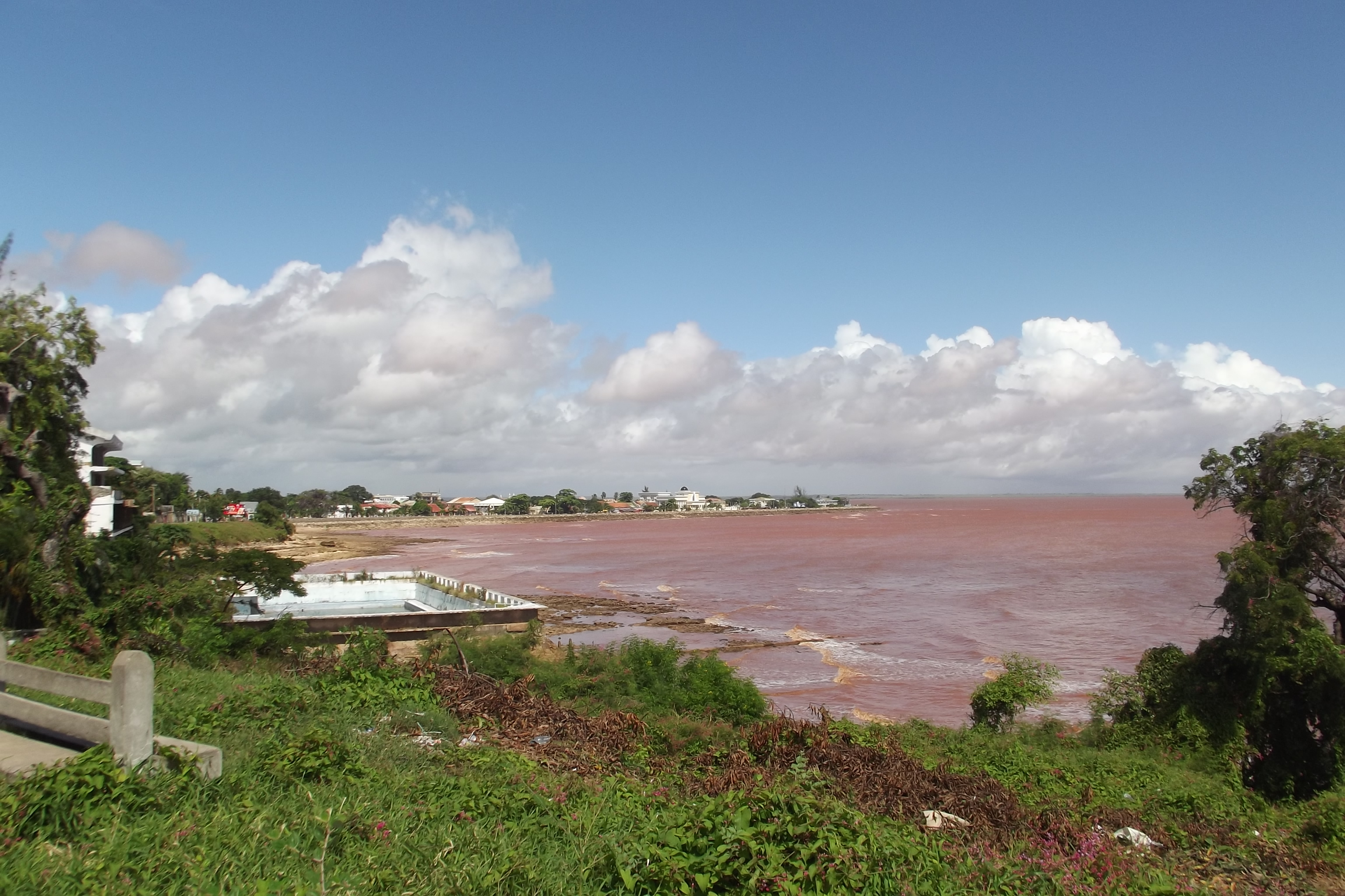 Vue de l'embouchure de la Betsiboka ( ou baie de Bobetoka) avec ses flots pourpres caractéristiques des périodes de crues